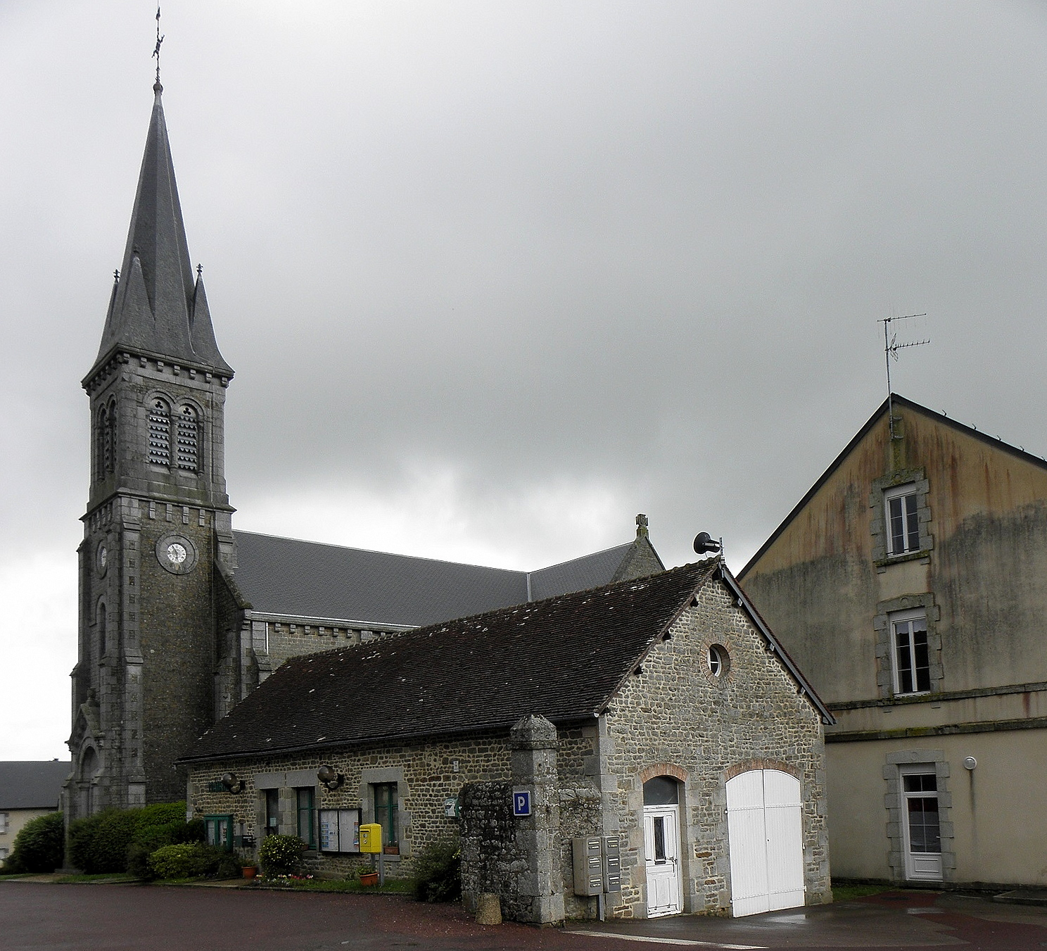 Mairie et église Saint-Clair de Gandelain (61).